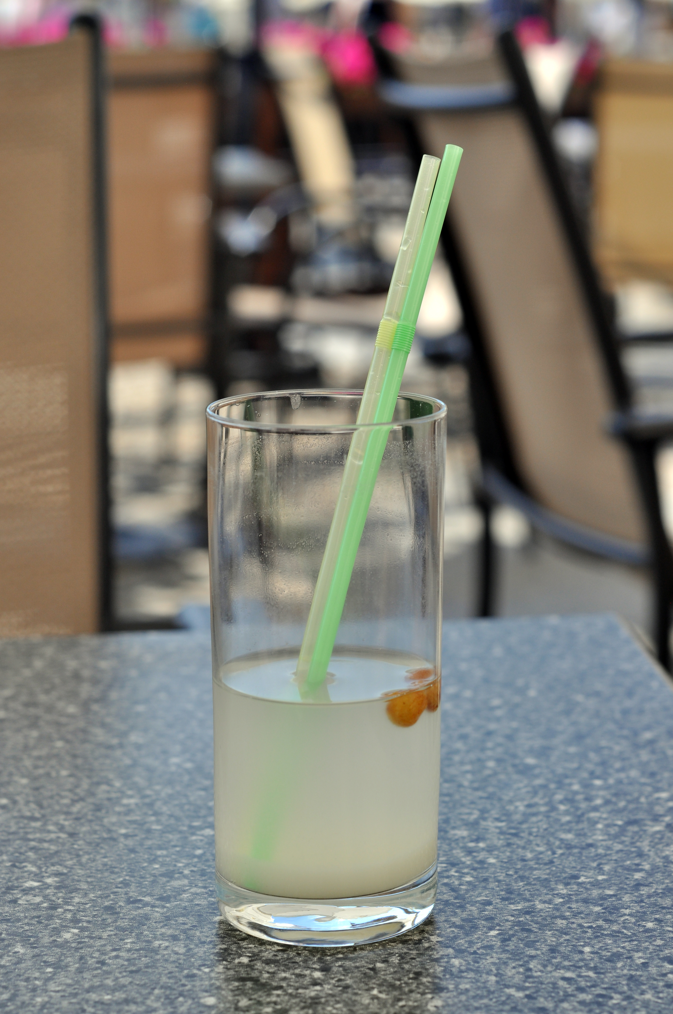 Szklanka z buzą z kaszy jaglanej z rodzynkami. BiałystokEsperanto: Glaso da buza-trinkaĵo el milio kun sekvinberoj. Bjalistoko.